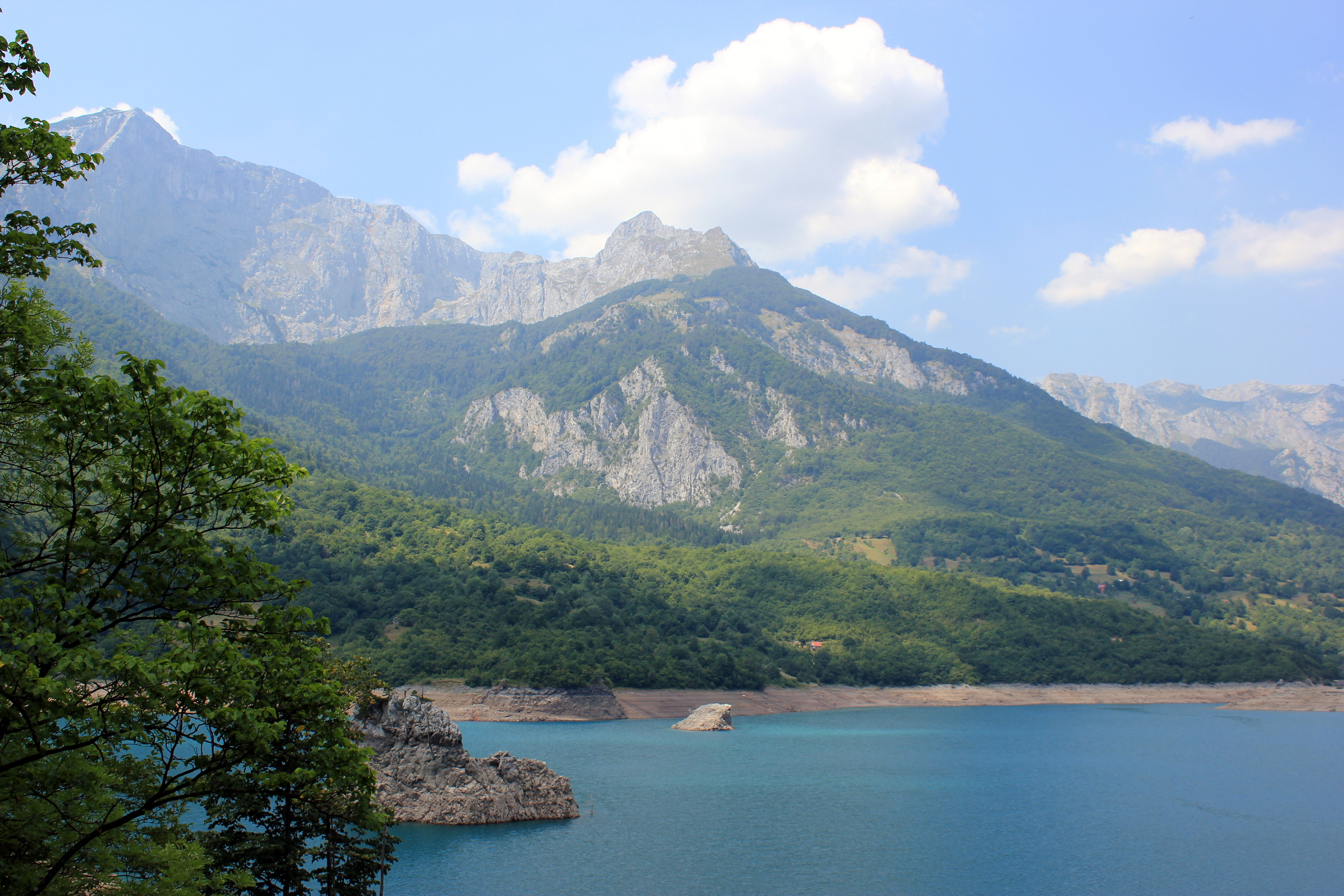 Am Piva-Stausee bei Plužine, Montenegro.Hornjoserbsce: Spjaty jězor Piwy pola Plužine na sewjerozapadźe Čorneje hory.